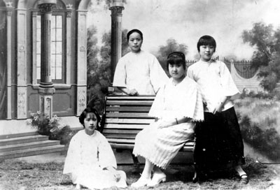 张允和（1909年7月25日－2002年8月14日），出生于安徽合肥的苏州世家，近代学者。此图是张家四姐妹合影（左一张允和，右一张元和）。